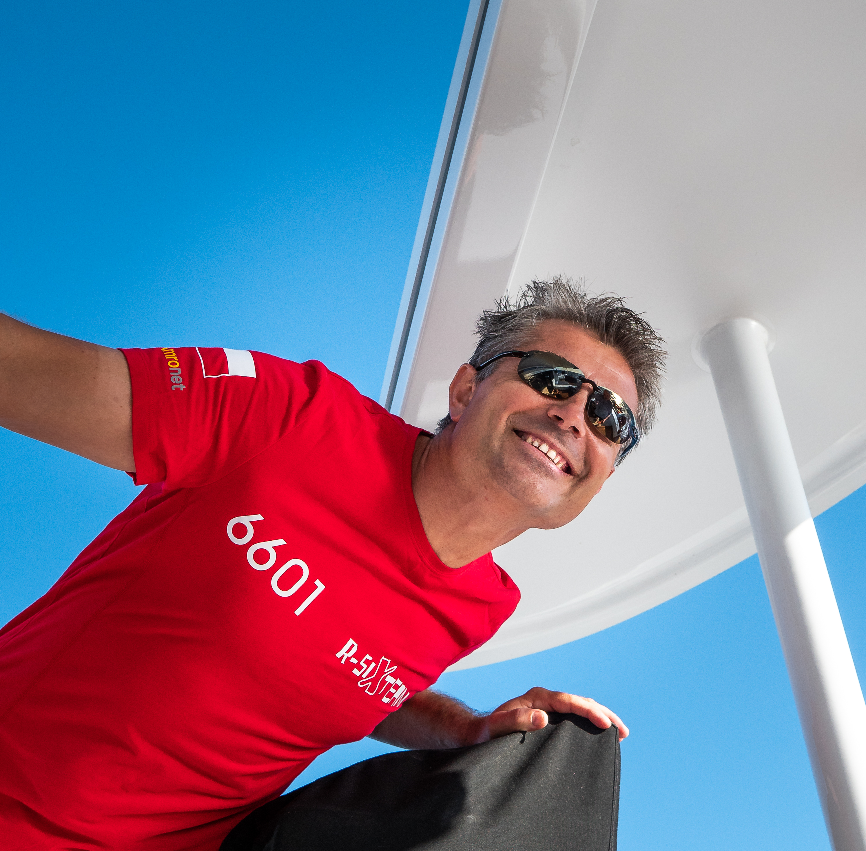 Robert Janecki